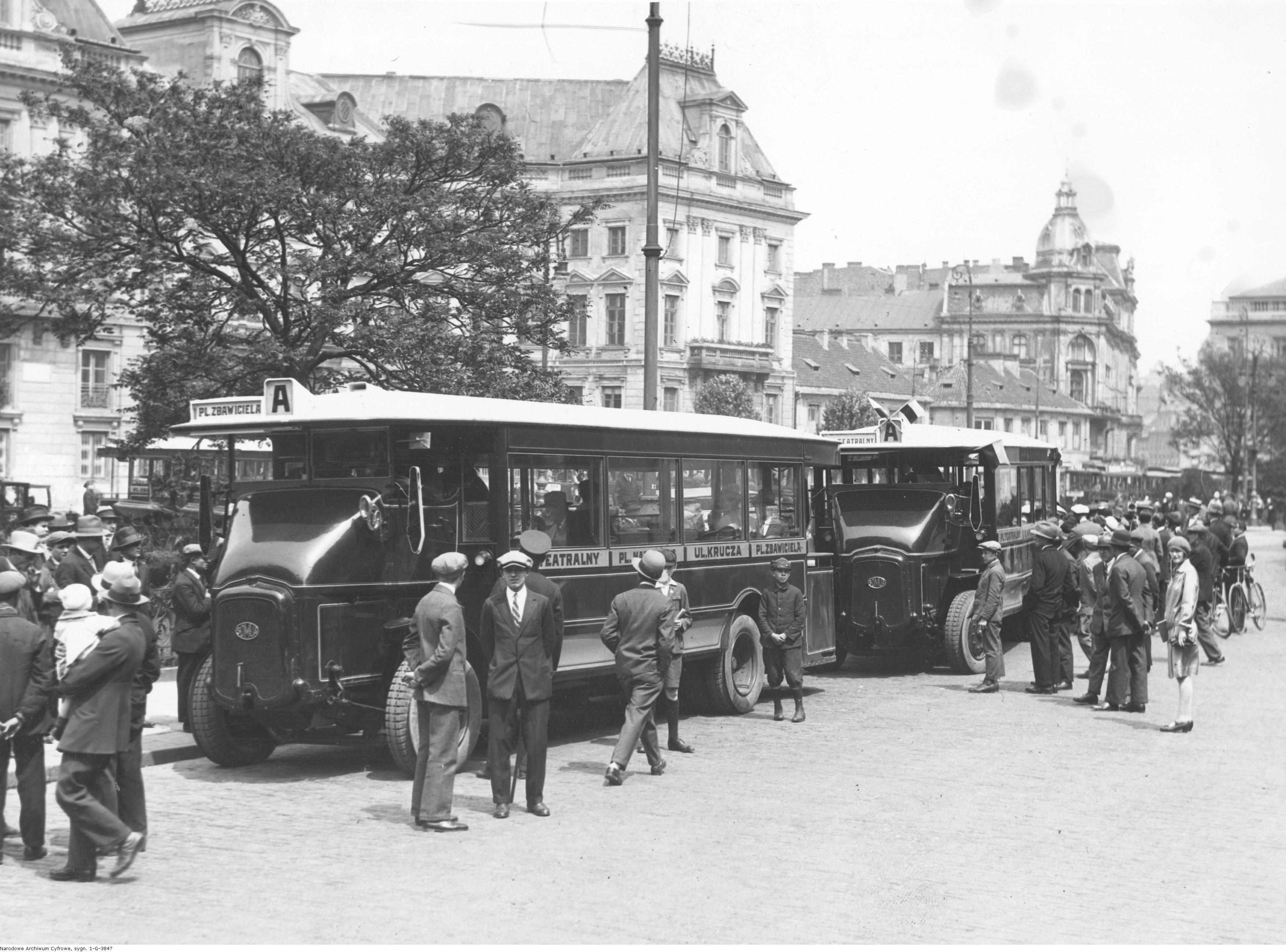 Plac Teatralny w Warszawie w okresie międzywojennym. Uruchomienie nowej linii autobusowej Plac Zbawiciela-Plac Teatralny